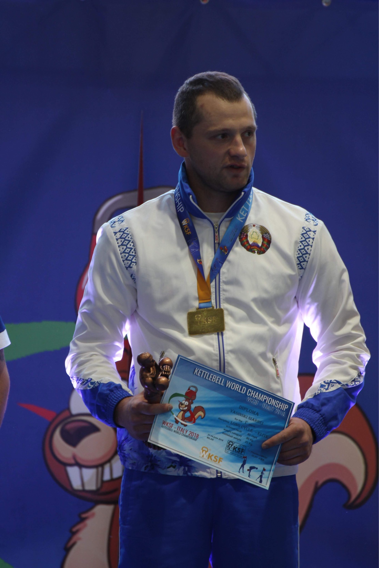 Италия, чемпионат мира 2018 г.